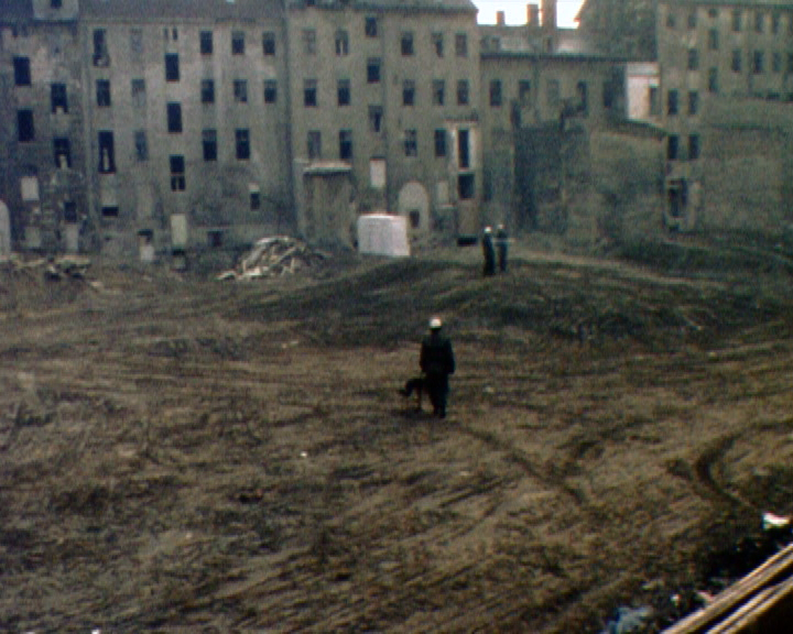 Der Block 104 bezeichnet einen Altbau-Komplex in Berlin-Kreuzberg. Er wurde bis 1981 zur Hälfte zerstört, der Rest blieb durch die Hausbesetzer-Bewegung erhalten. Durchsuchung Oranienstr. 198 (1981). Die Abrissfläche ist heute Park (Nähe U-Görlitzer Bahnhof).